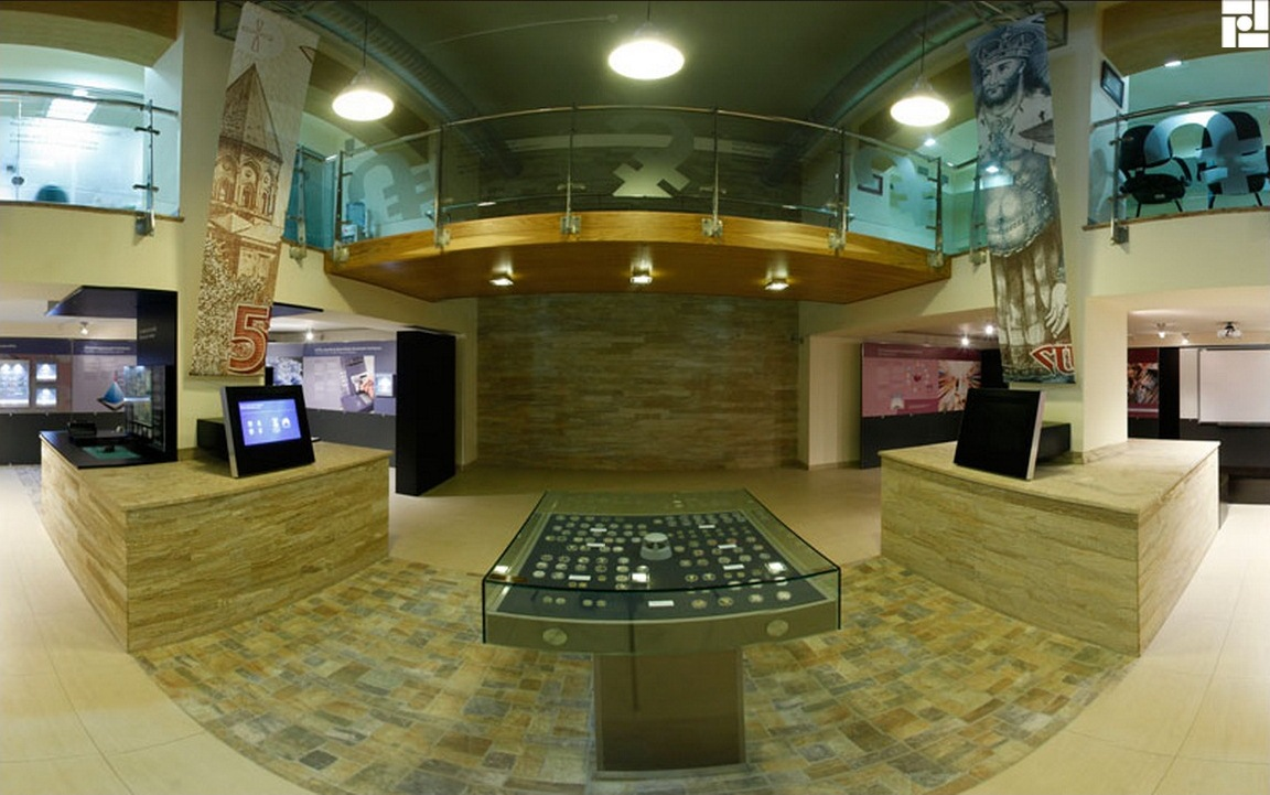 ՀՀ կենտրոնական բանկի այցելուների կենտրոն